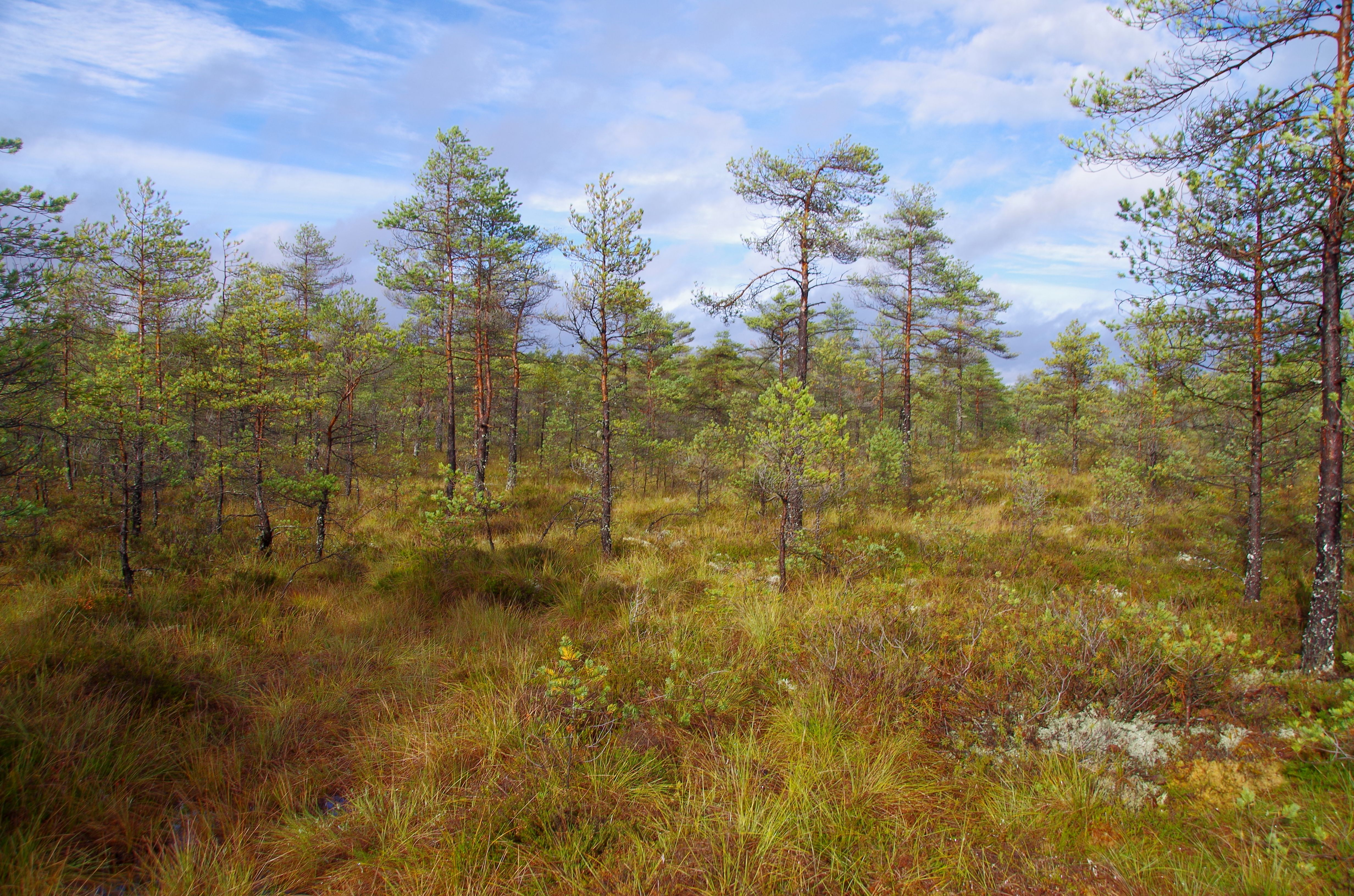 Rabivere soo ehk Hagudi soo ehk Rabivere raba on raba Raplamaal Kohila vallas ja alevis. Soo jääb Rabivere maastikukaitseala piiresse. Raba on osa Rabivere maastikukaitsealast.